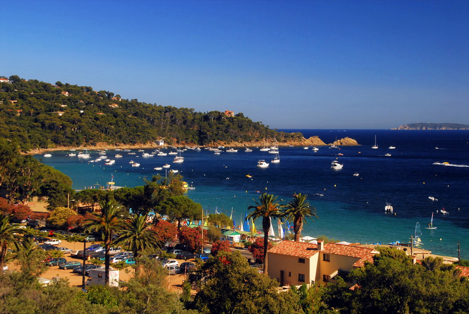 Cavaliere (Le Lavandou)